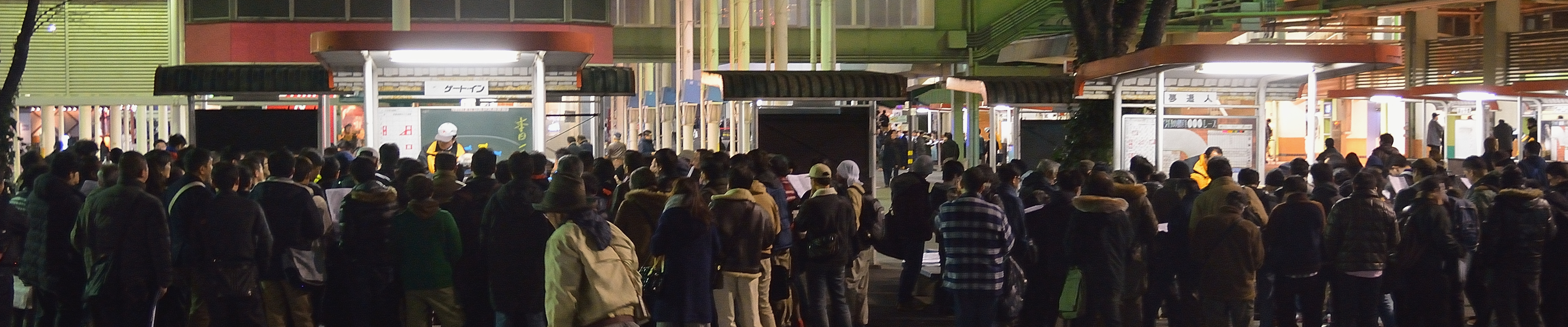 2015年12月31日に大井競馬場の場内で、勝ち馬予想を提供する予想屋と観客の風景を撮影したもの。提供予想屋は「ゲートイン」（左側）と「夢追人」（右側）の2店。予想している競走は、大井競馬場の2015年最後の競走である第12競走の「おおとりオープン」。